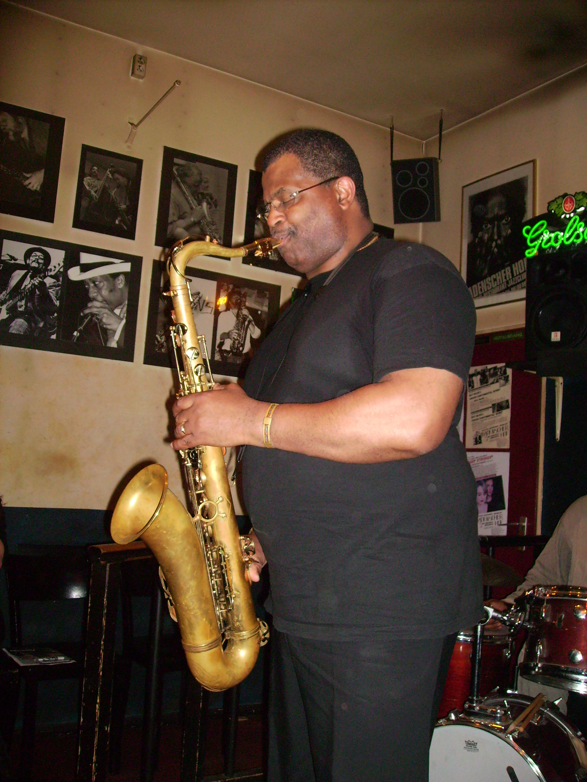 Ray Blue am 4 Juni 2010 in Berlin